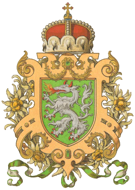 Wappen des Herzogtums